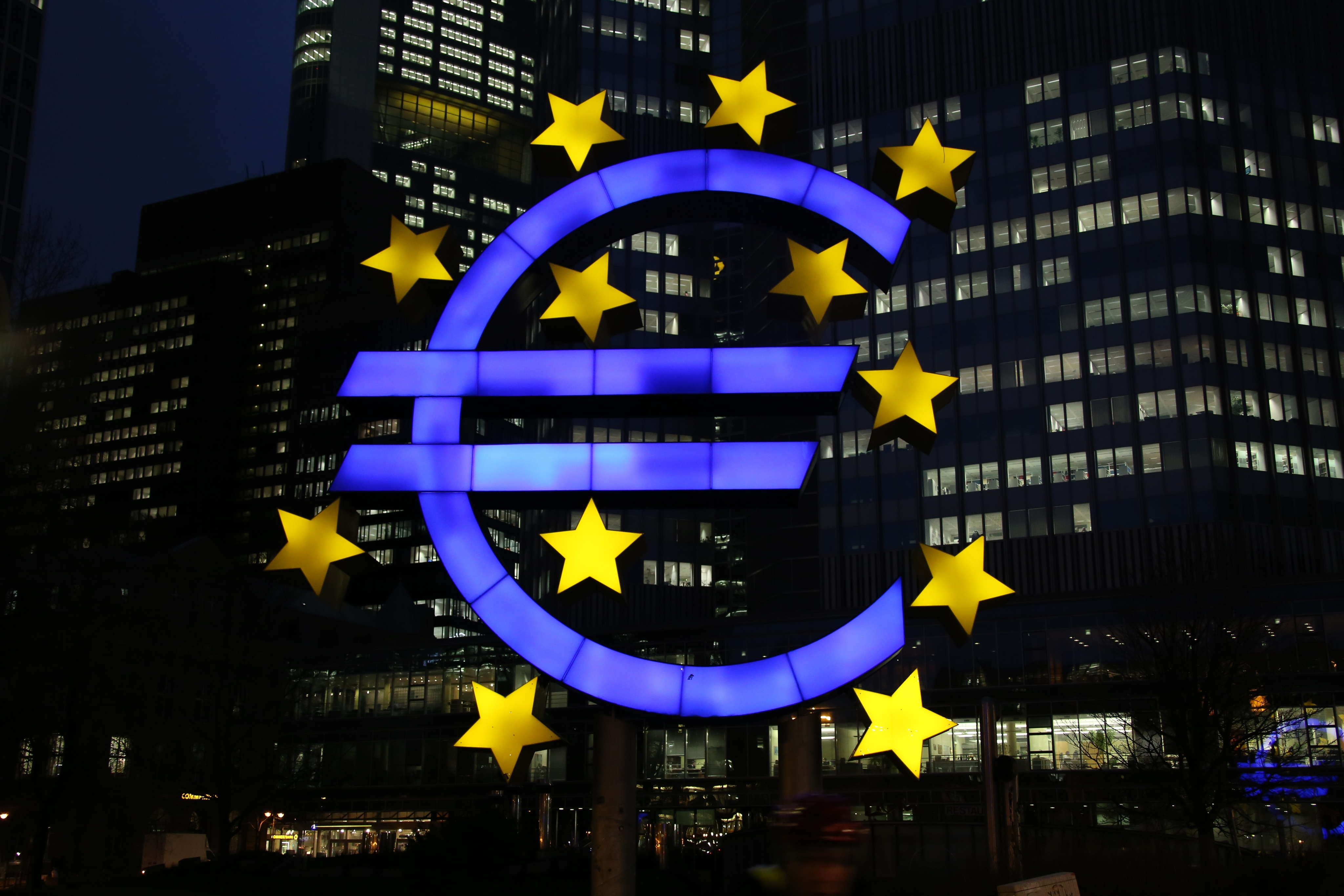 Euro-Skulptur bei Nacht, Eurotower Frankfurt